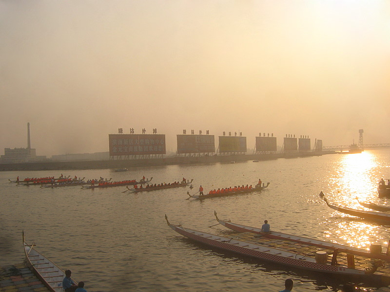 Dragonboat race in Tanggu, China.